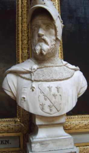 Buste de Jacques de Bourbon dans la galerie des batailles du château de Versailles.